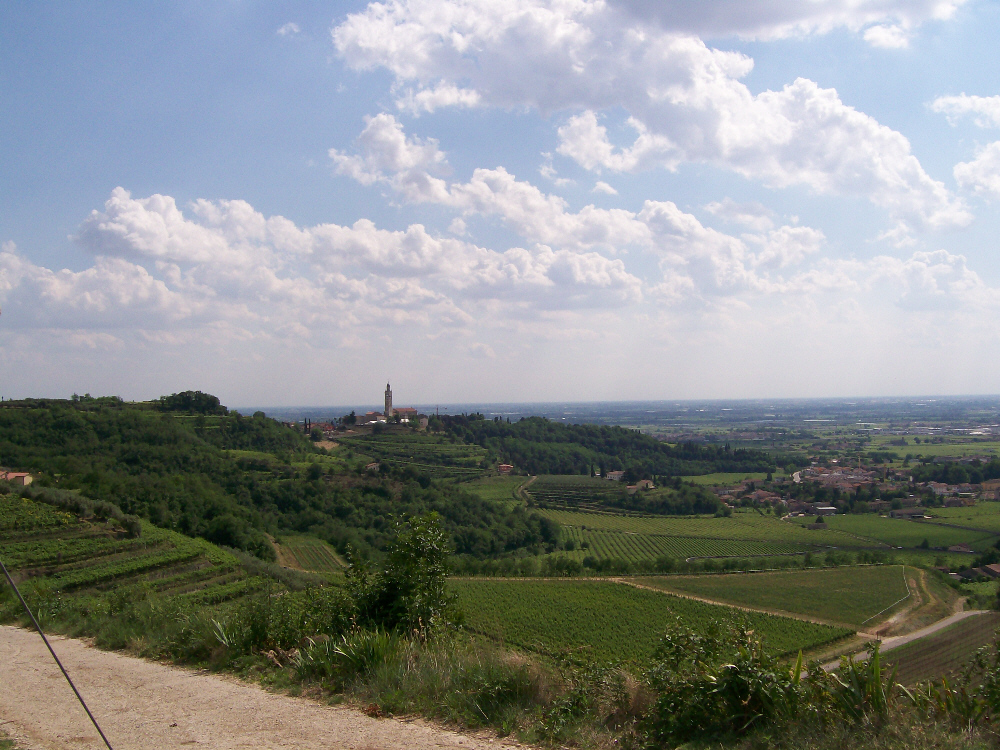 Scattata da me il 16 maggio 2007. Monte e Villa visti dalla zona di Bocca Scalucce. In particolare potete ammirare il campanile della parrocchiale di Monte dedicata ai Santi Fermo e Rustico